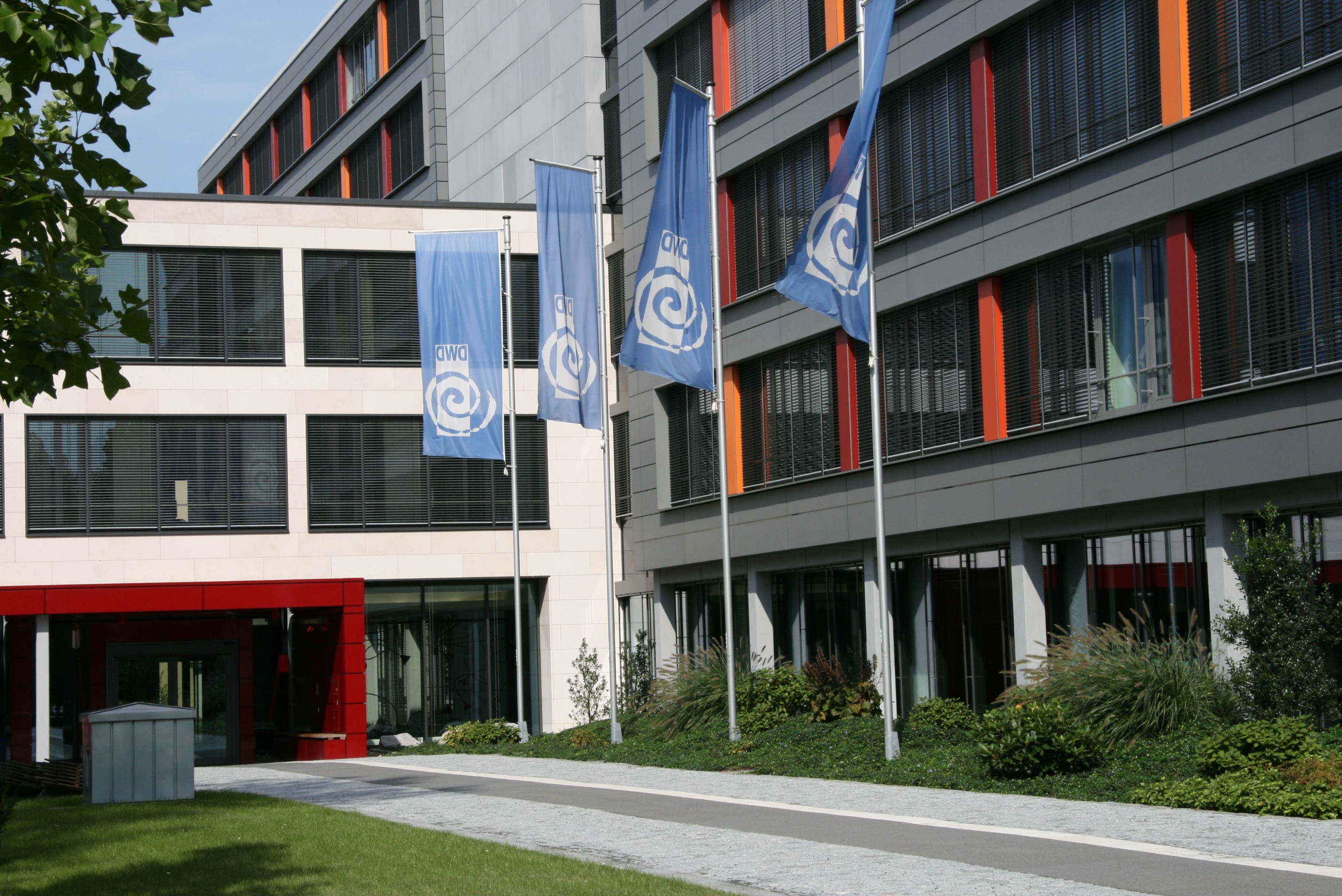 Eingangsbereich des Deutschen Wetterdienstes